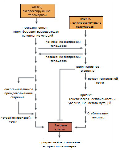 Экспрессия теломеразы и развитие рака